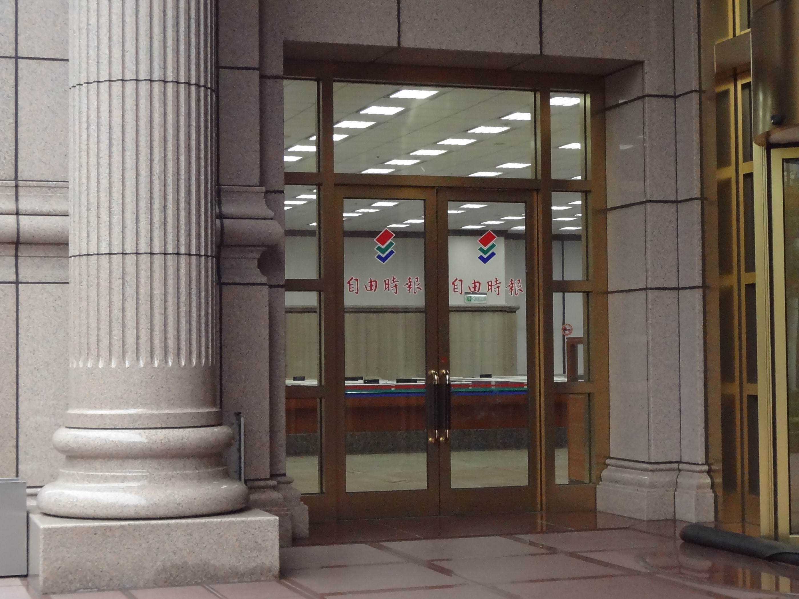 《自由時報》第二代總社，位於臺北市內湖區瑞光路399號1樓（聯邦大樓自由廣場）。